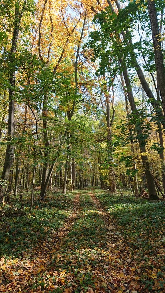 fotka přírodní památky Jiřina - lužní les